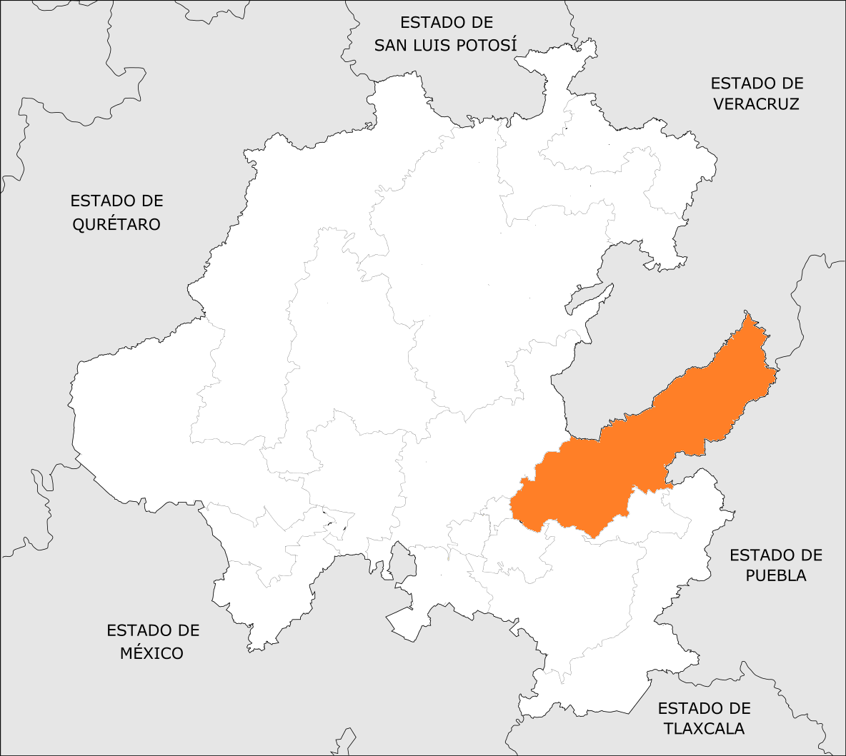 Distrito Electoral Local de Hidalgo 09